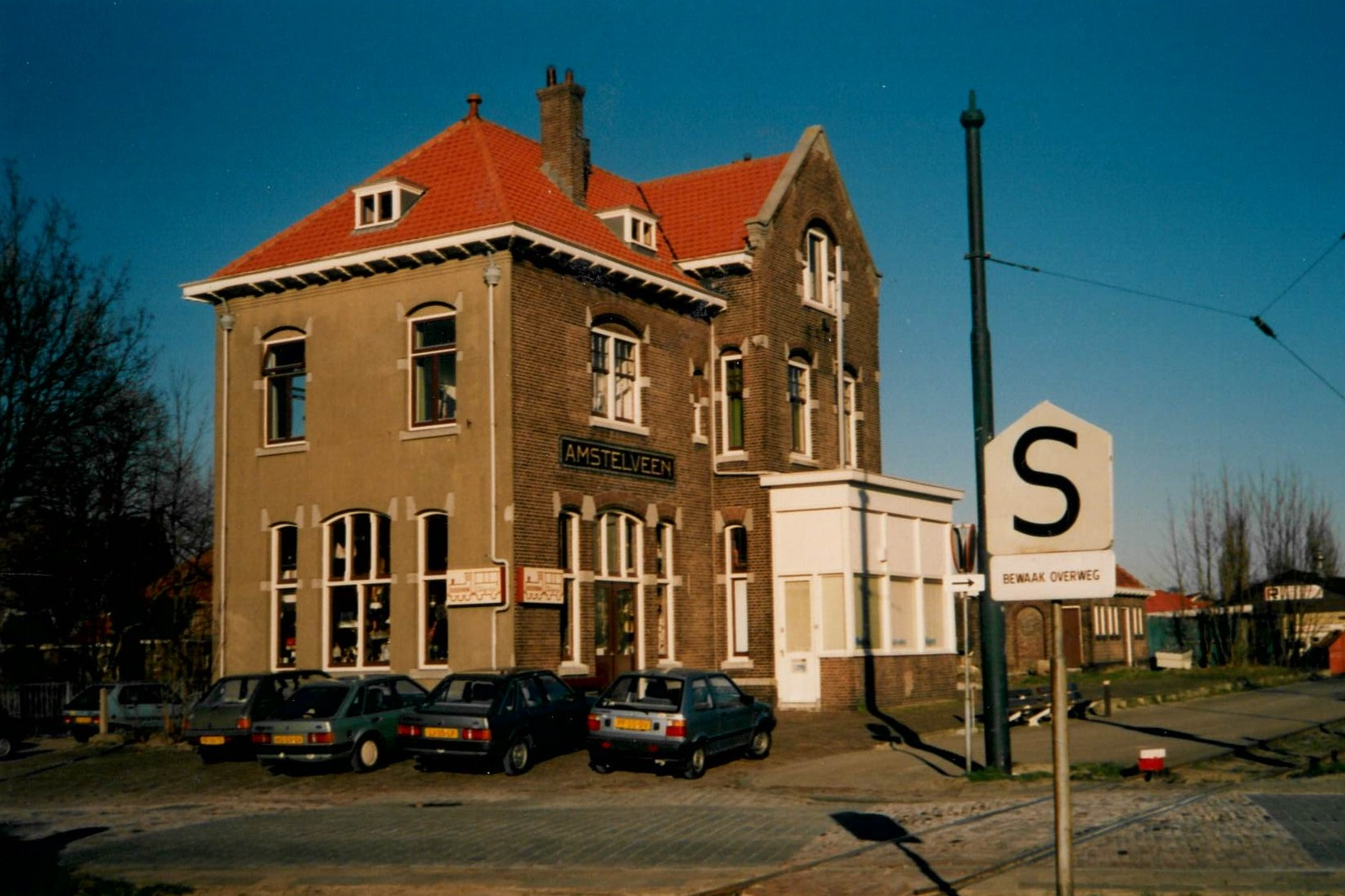 Station Amstelveen (foto: Daniel van der Ree, 15 januari 1991)